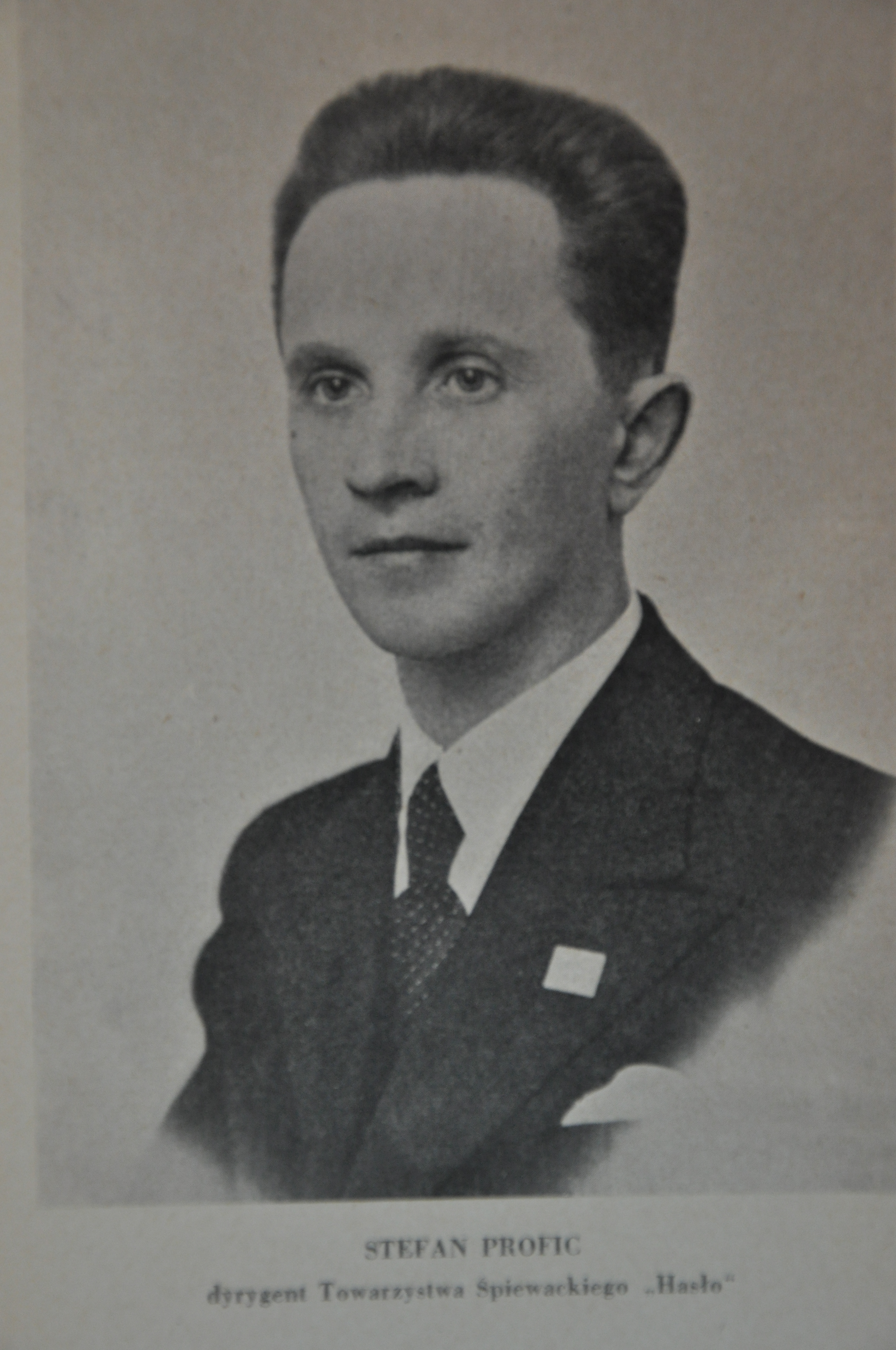 Profesor Stafan Profic, Organista w Bazylice Mariackiej w Krakowie, Dyrygent Chóru Hasło